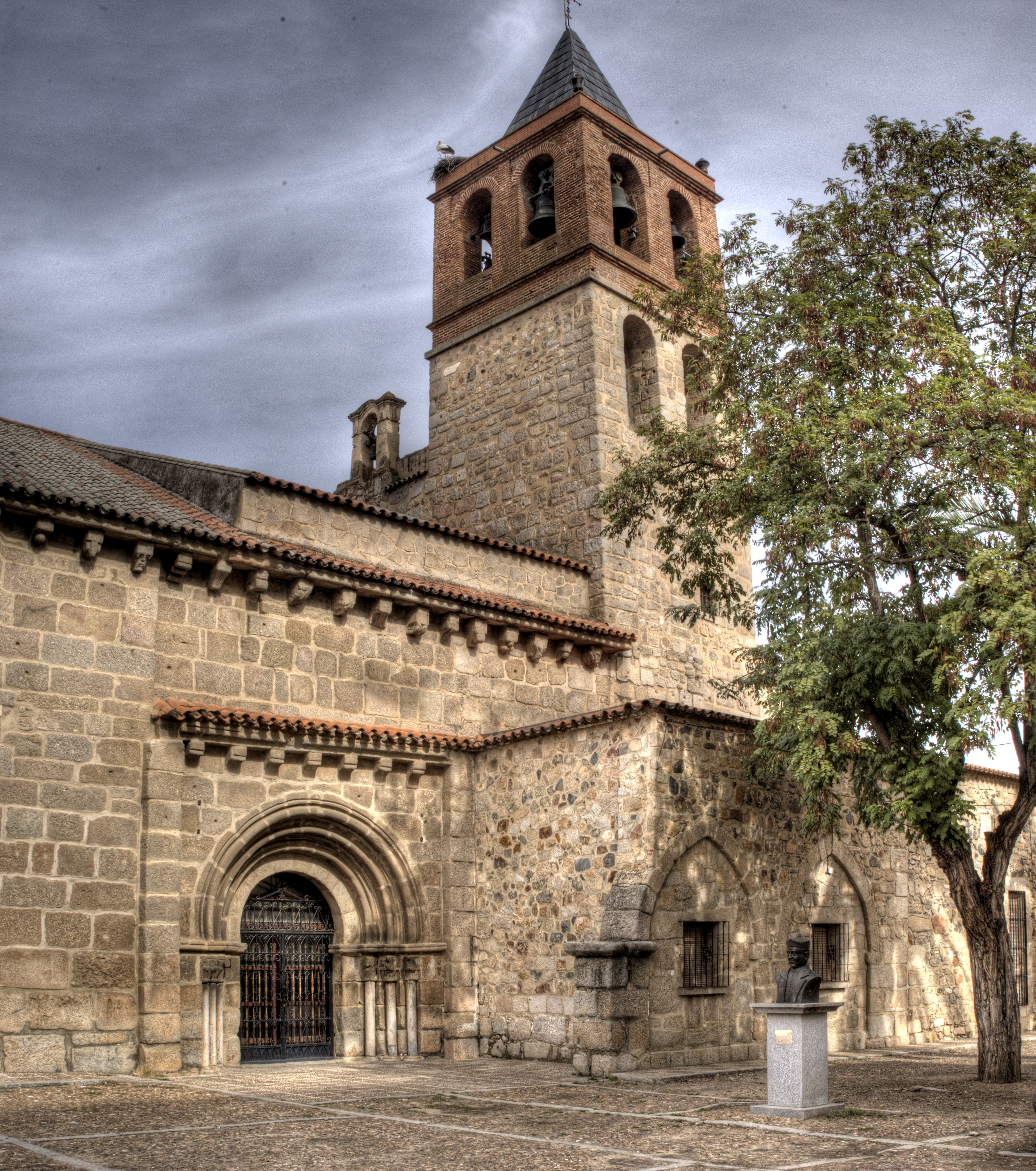 Basílica de Santa Eulalia